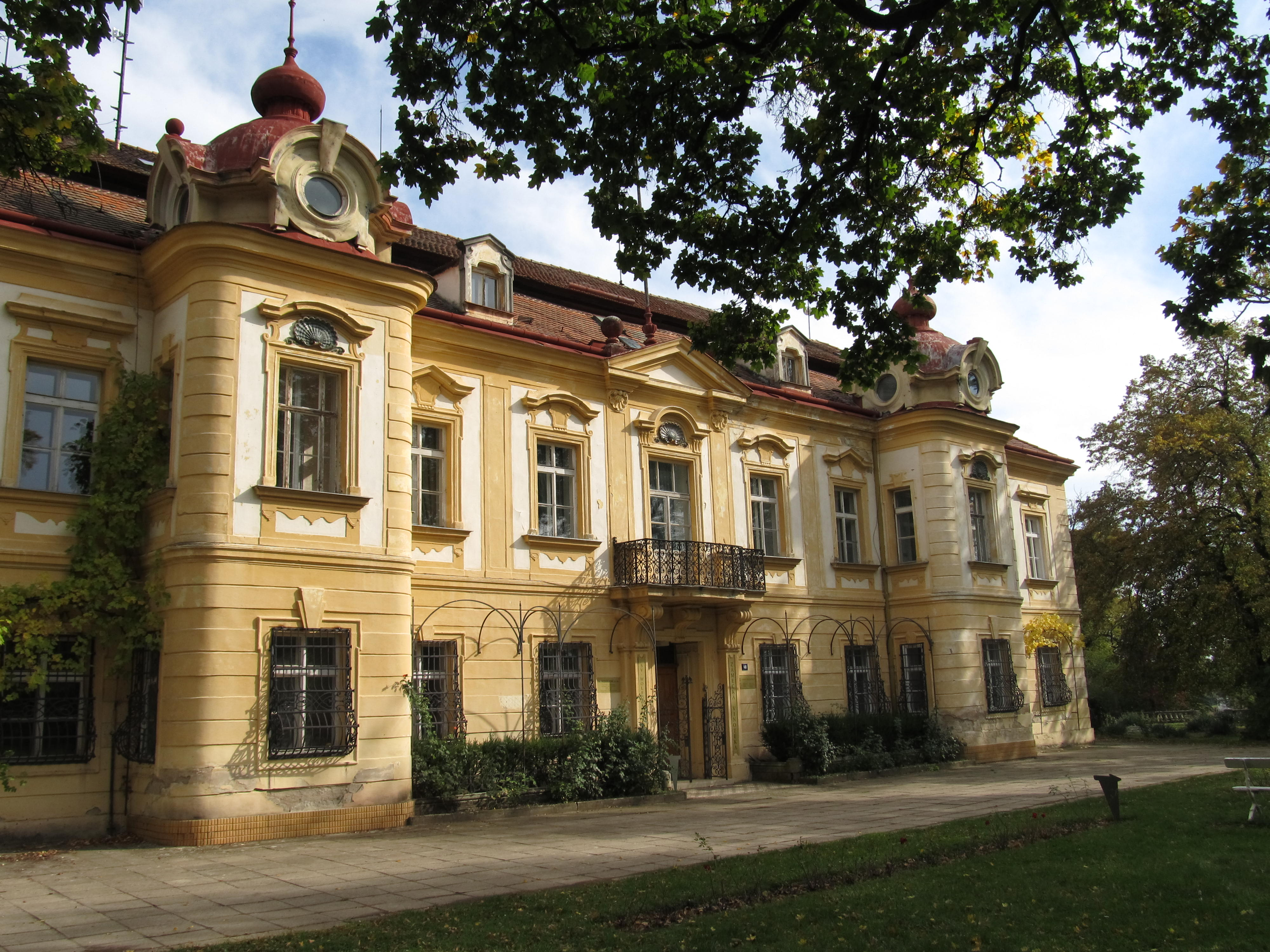 Západní průčelí zámku